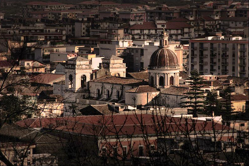 Vista sul duomo di Giarre dalle colline retrostanti